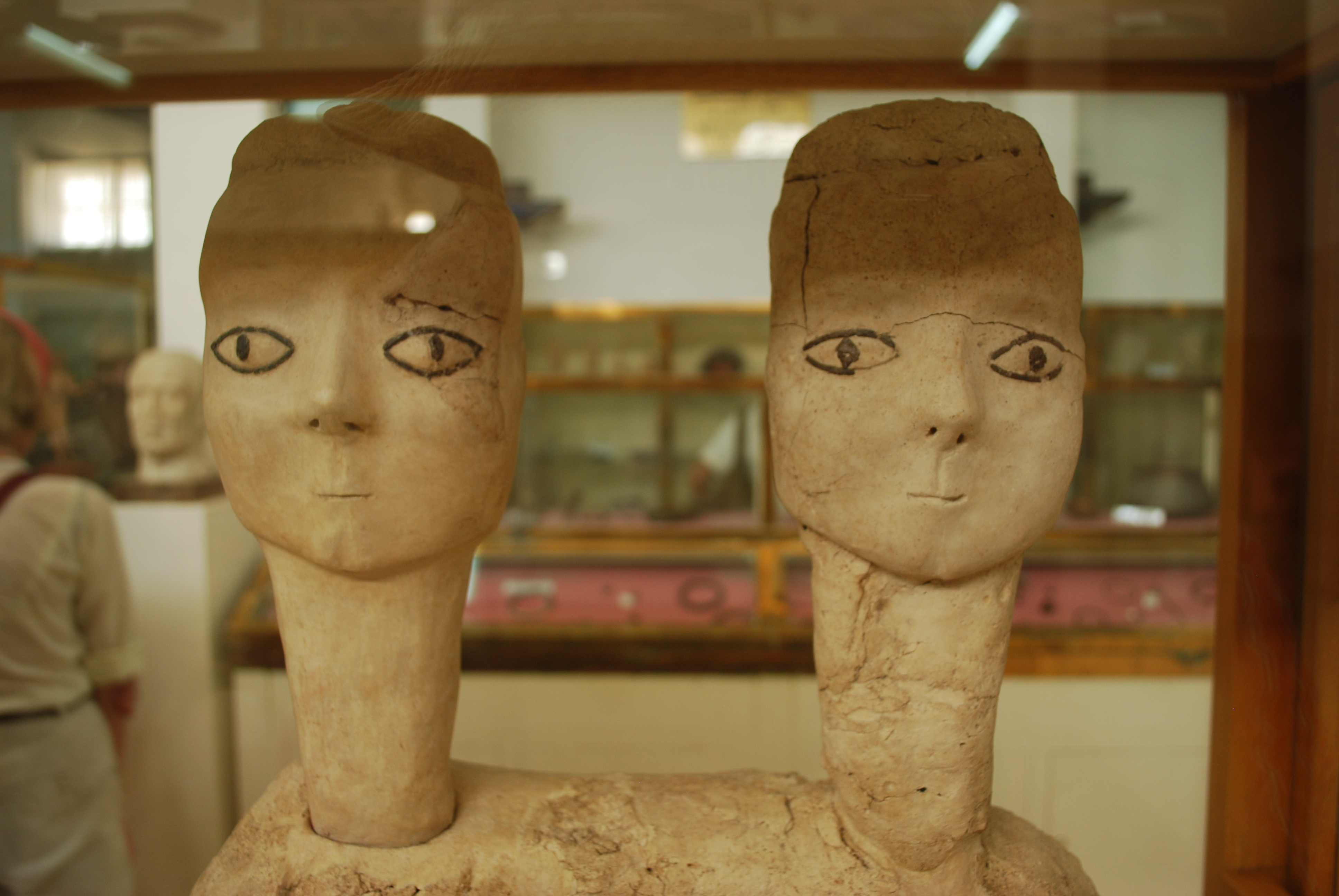 Les statues d'Ain Ghazal, au Musée archéologique de Jordanie (Citadelle d'Amman).